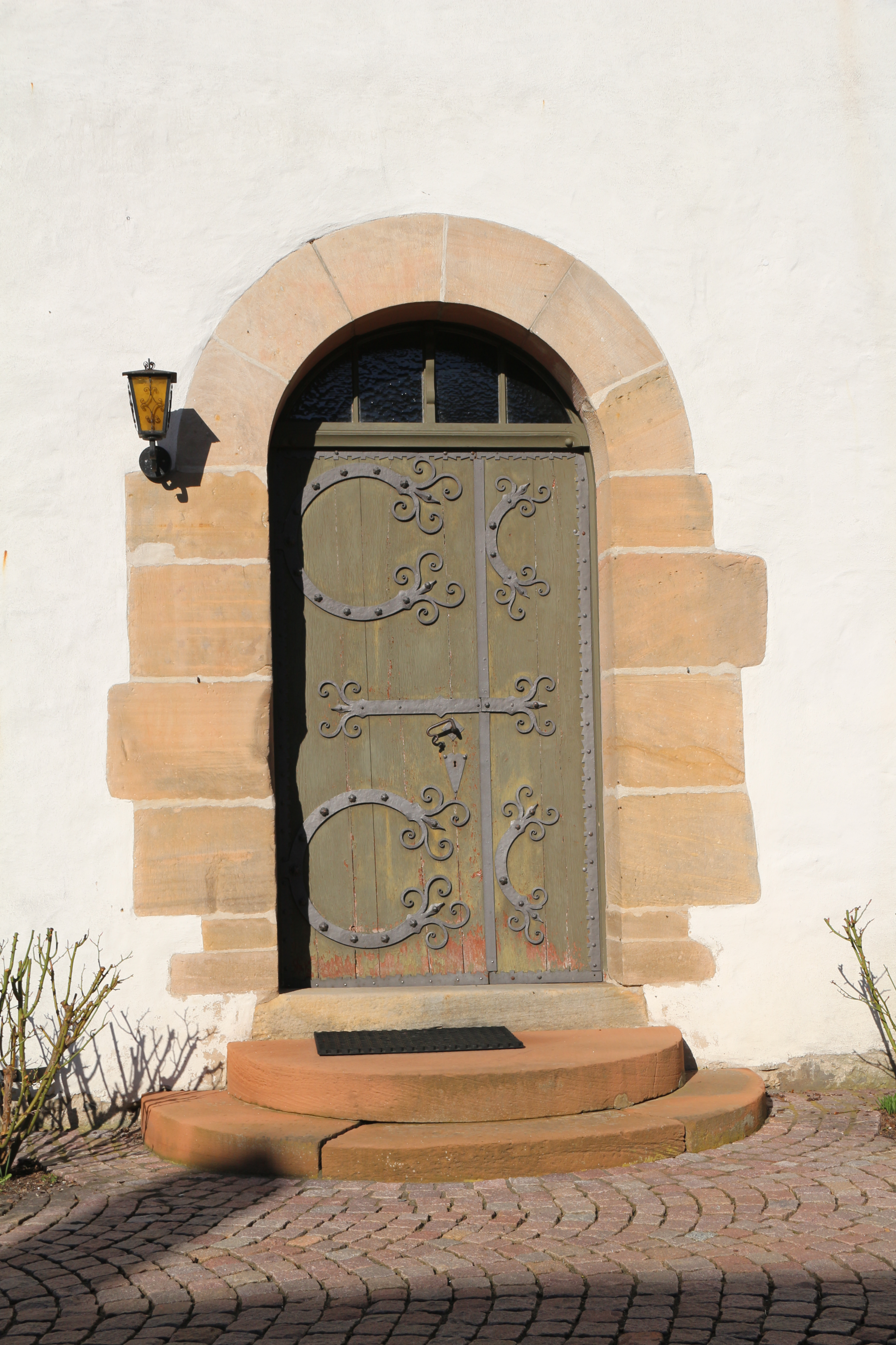 Lohra Kirche